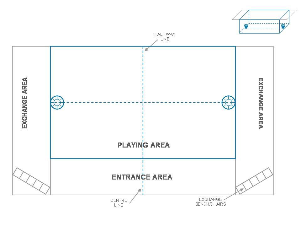 Spillerområde for undervannsrugby